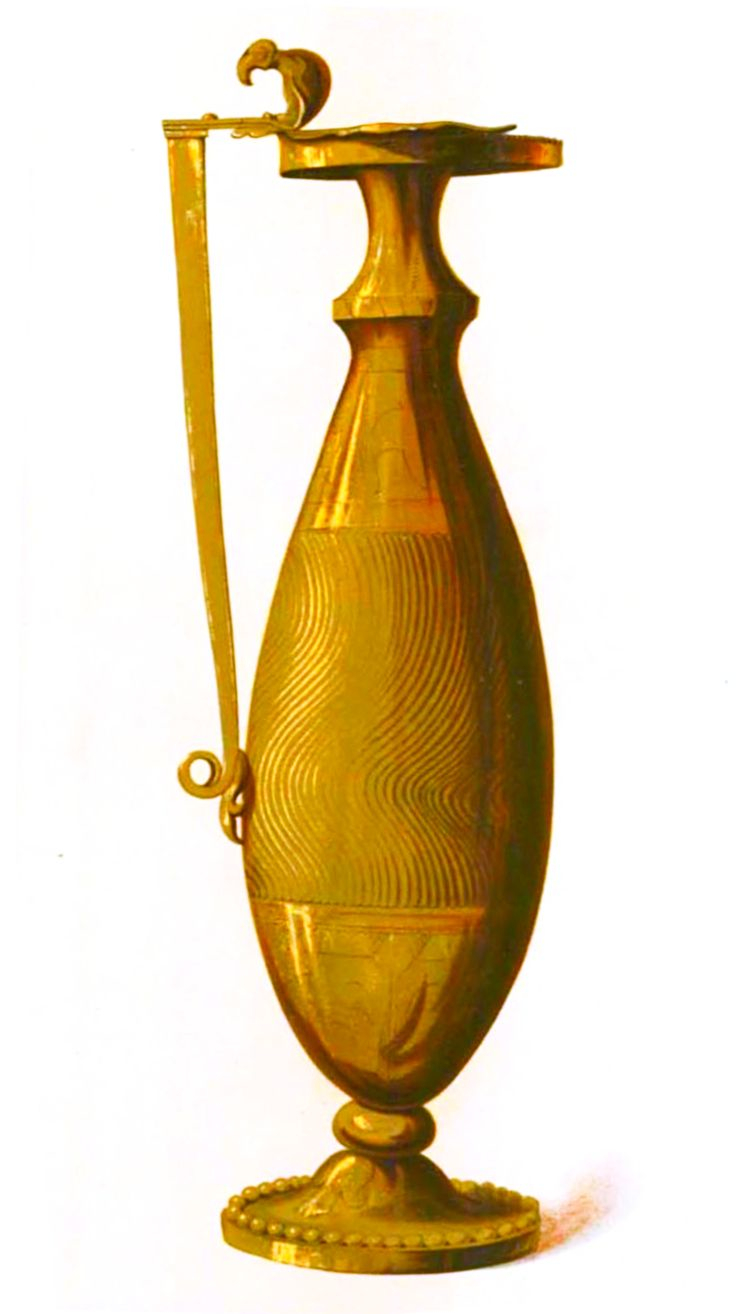 Cana / Ibricul de la Pietroasa